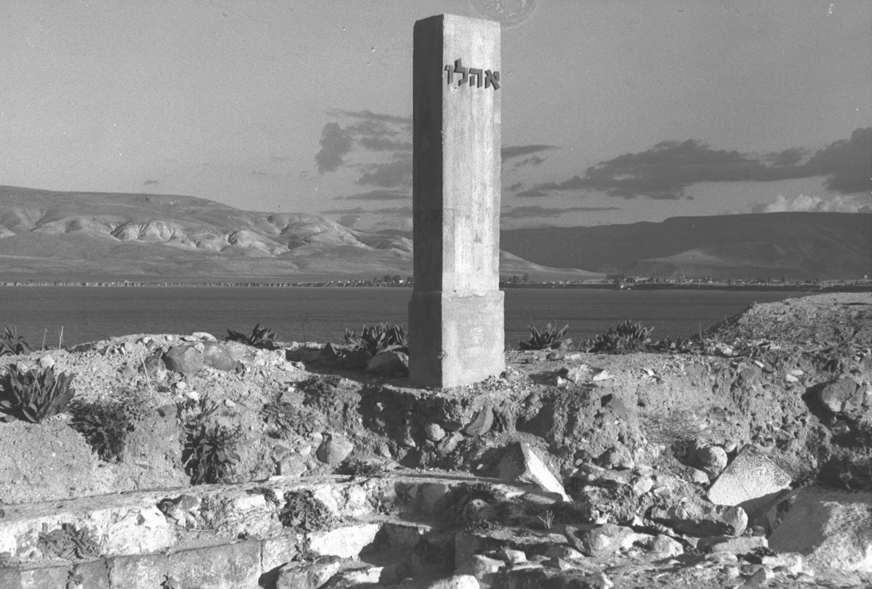 האנדרטה באוהלו לחוף הכנרת